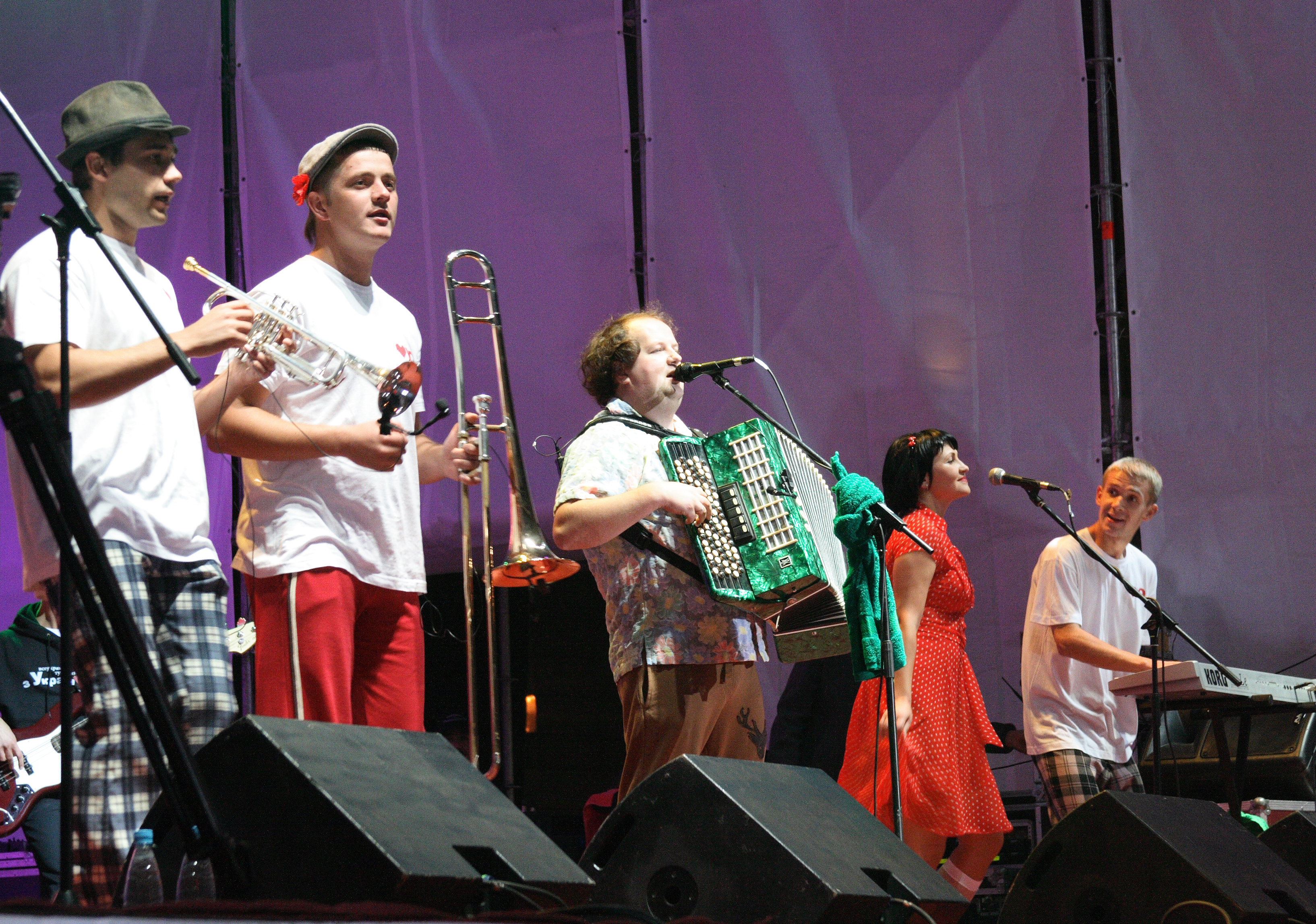 «ТиK» («Трезвость и Культура») — украинская музыкальная группа.